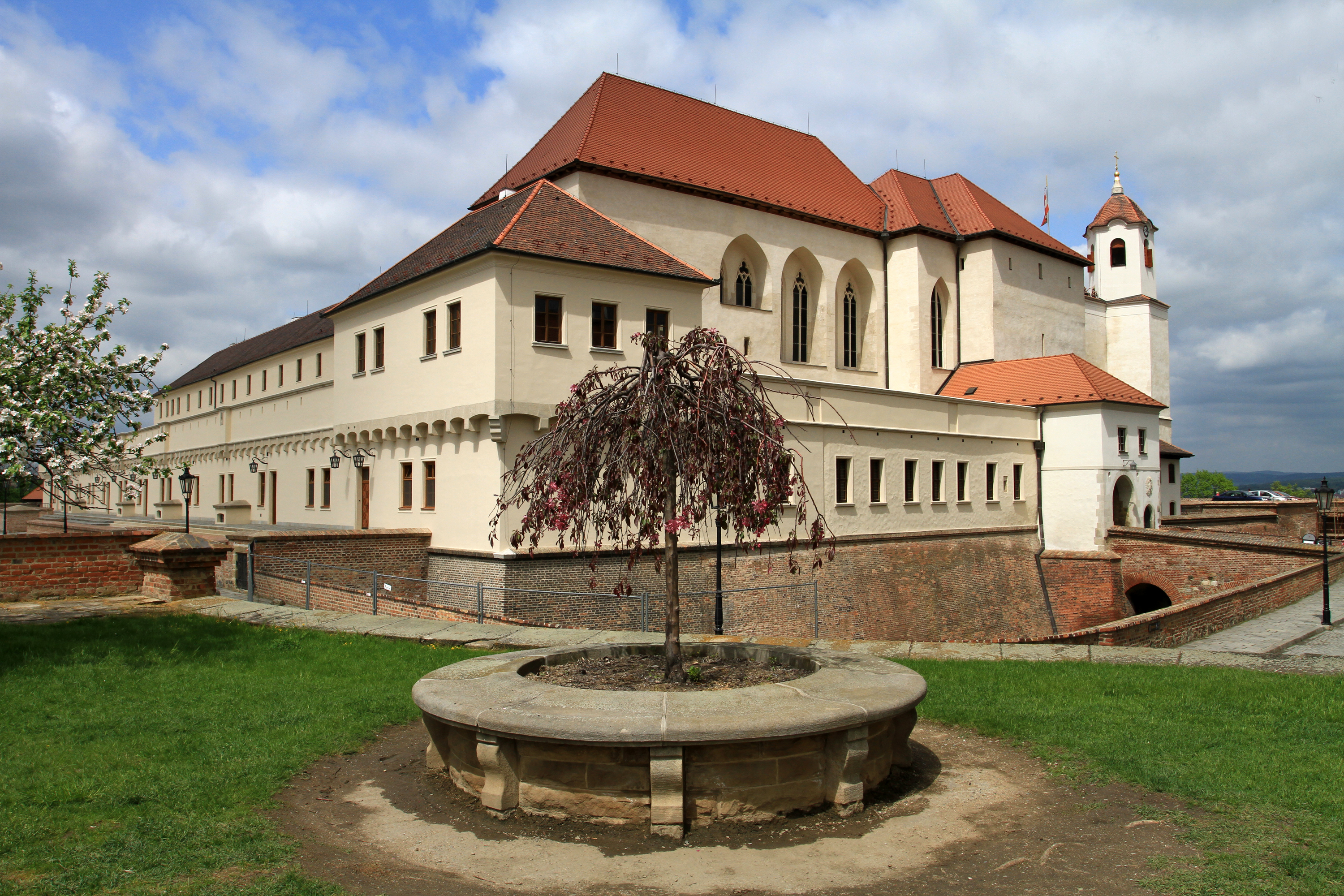 Hrad Špilberk (Brno), Brno - město 208, Brno